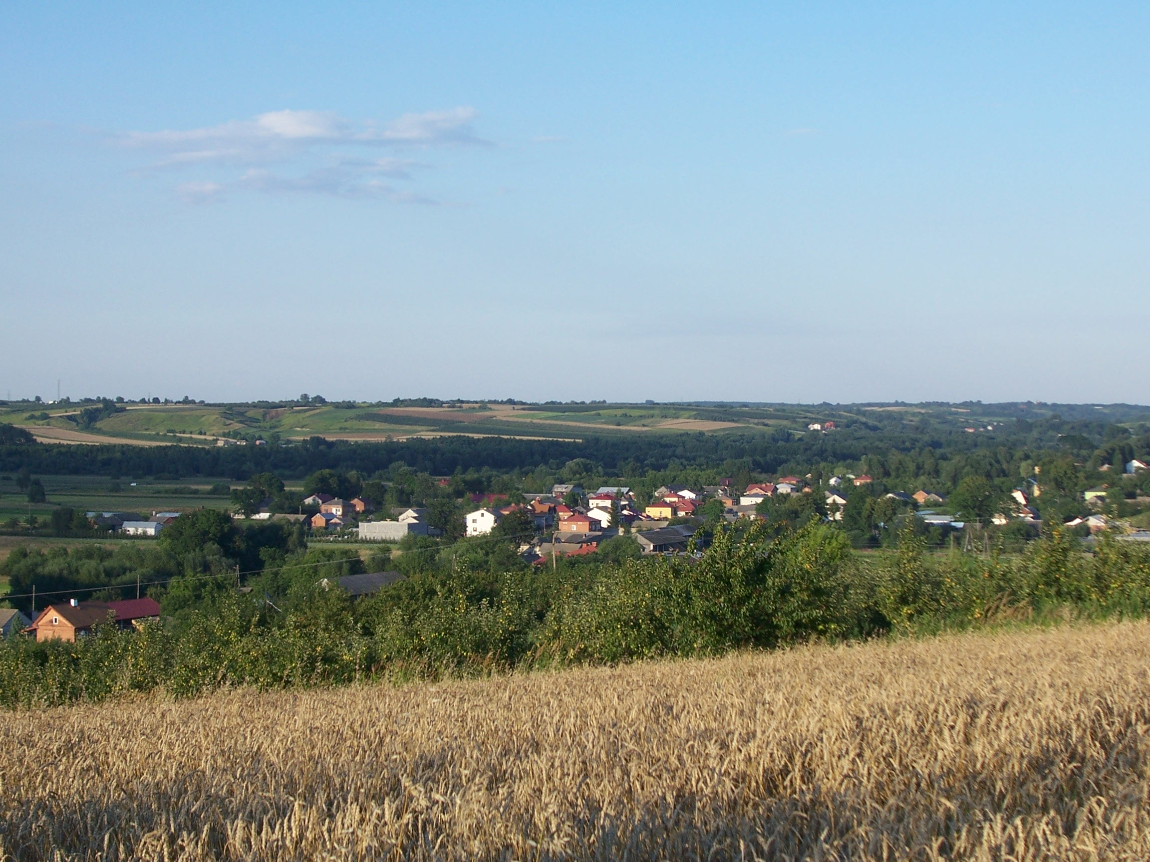 Radoszki